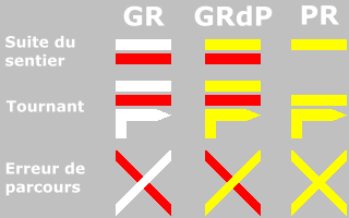 Balisage utilisé lors des chemins de grandes randonnées